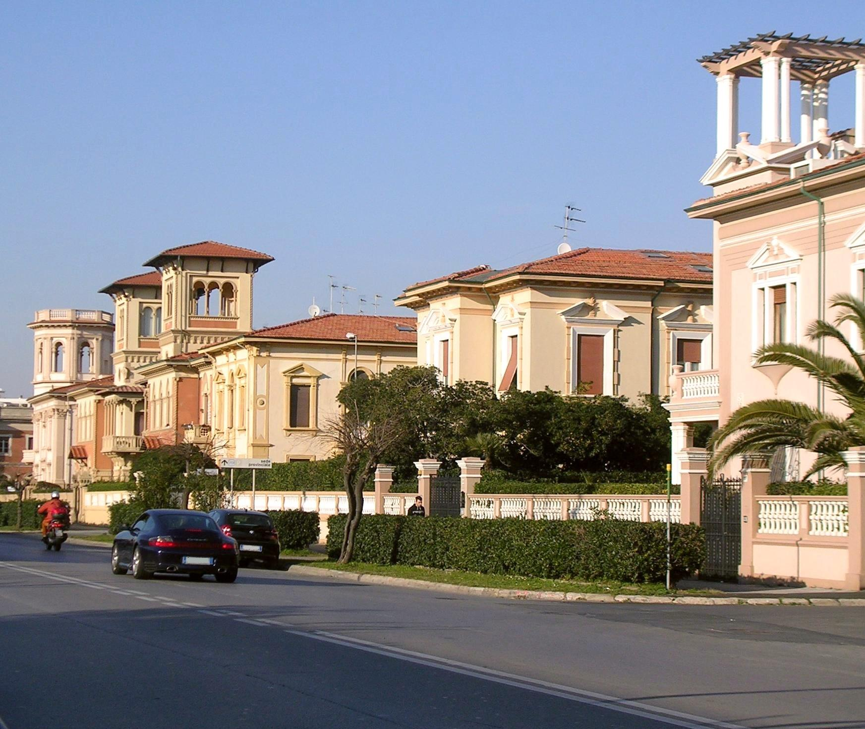 Livorno: i villini presso l'Accademia Navale, realizzati intorno al 1930.